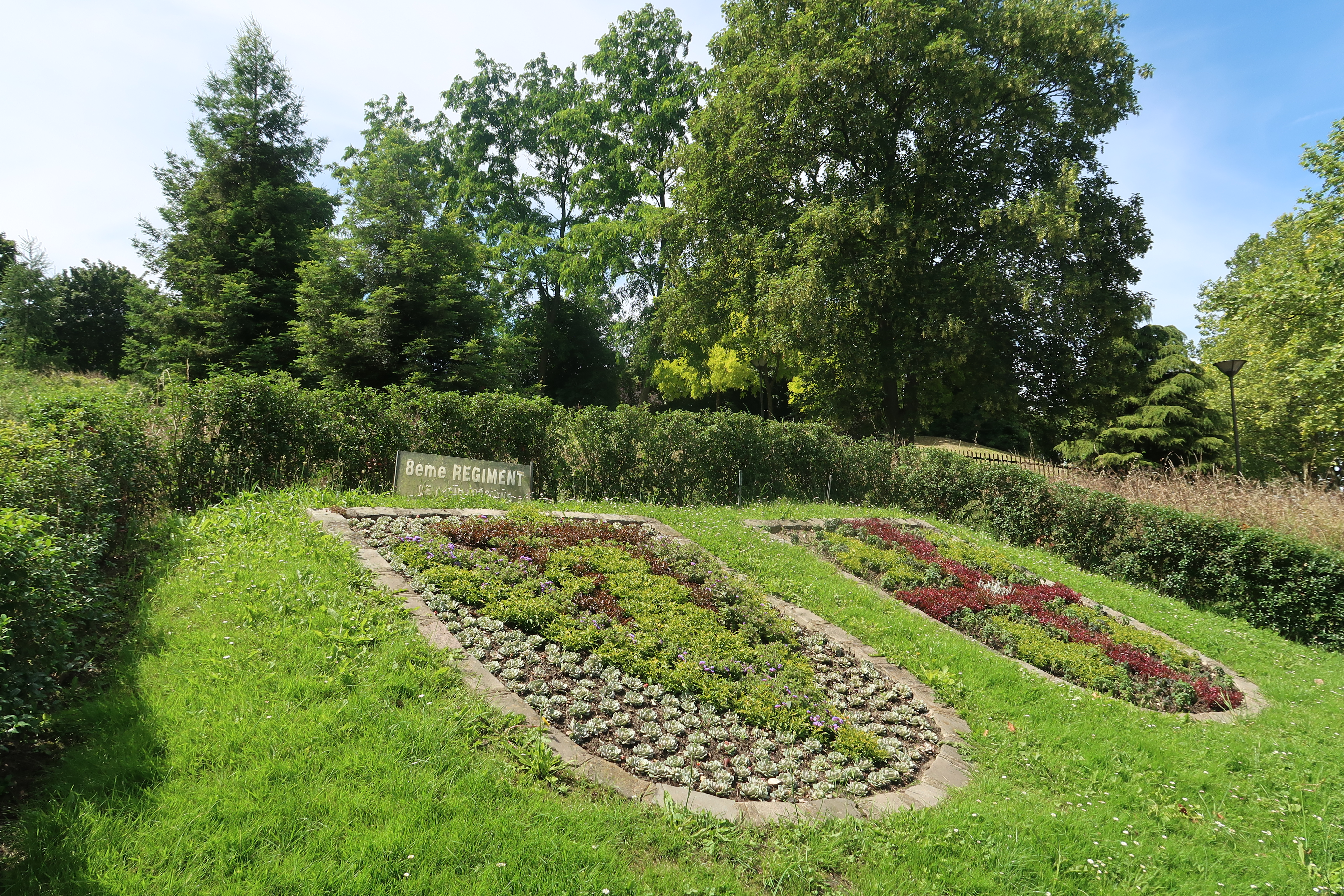 Parterre de fleurs à Suresnes (Hauts-de-Seine), en hommage au 8e régiment de transmissions, boulevard Washington.